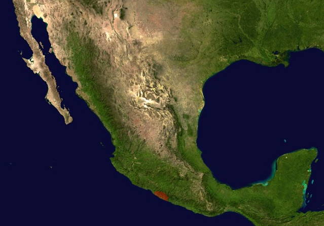 Distribution of Brachypelma boehmei in Mexico.